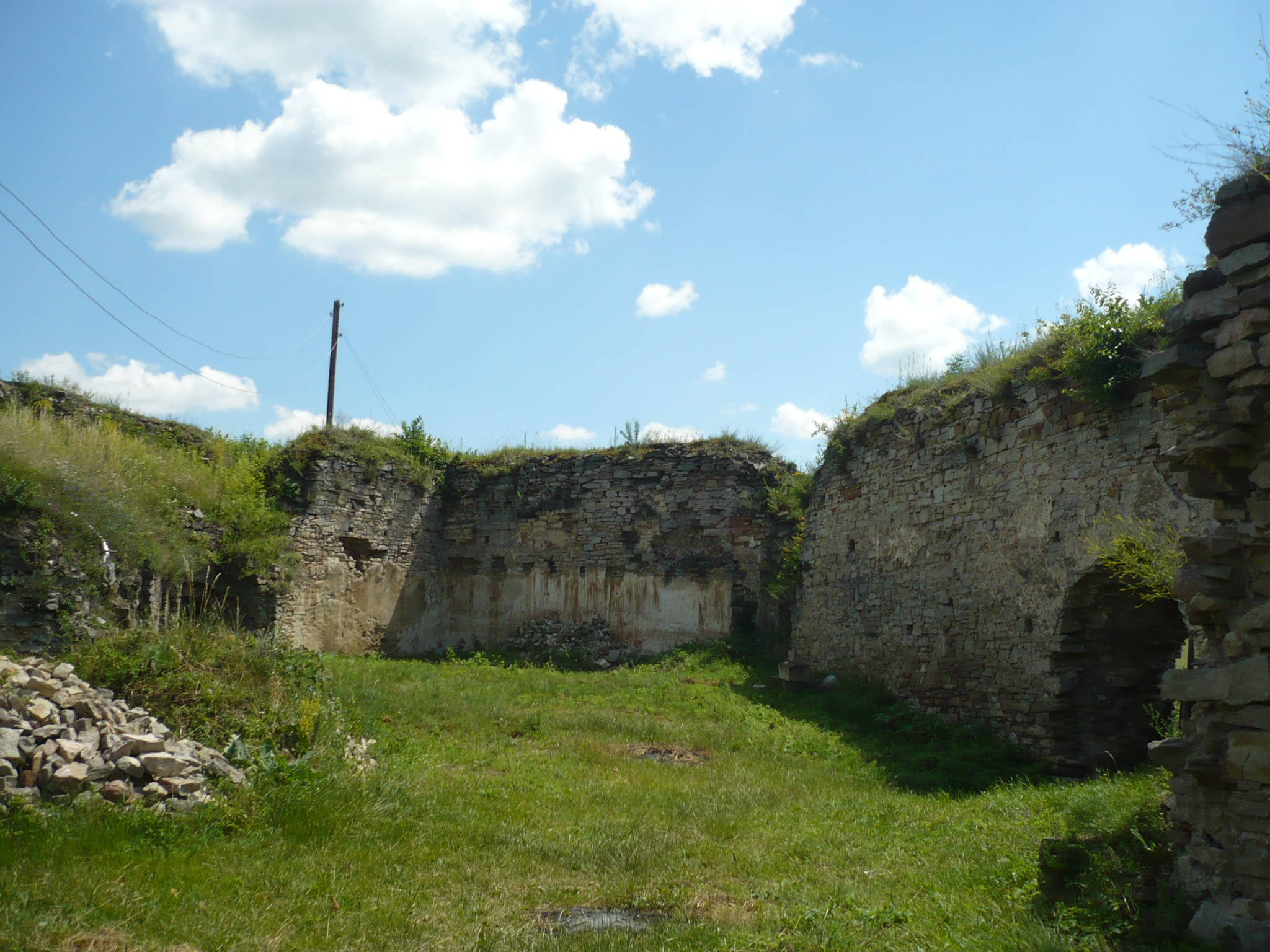 Jazłowiec. Zamek